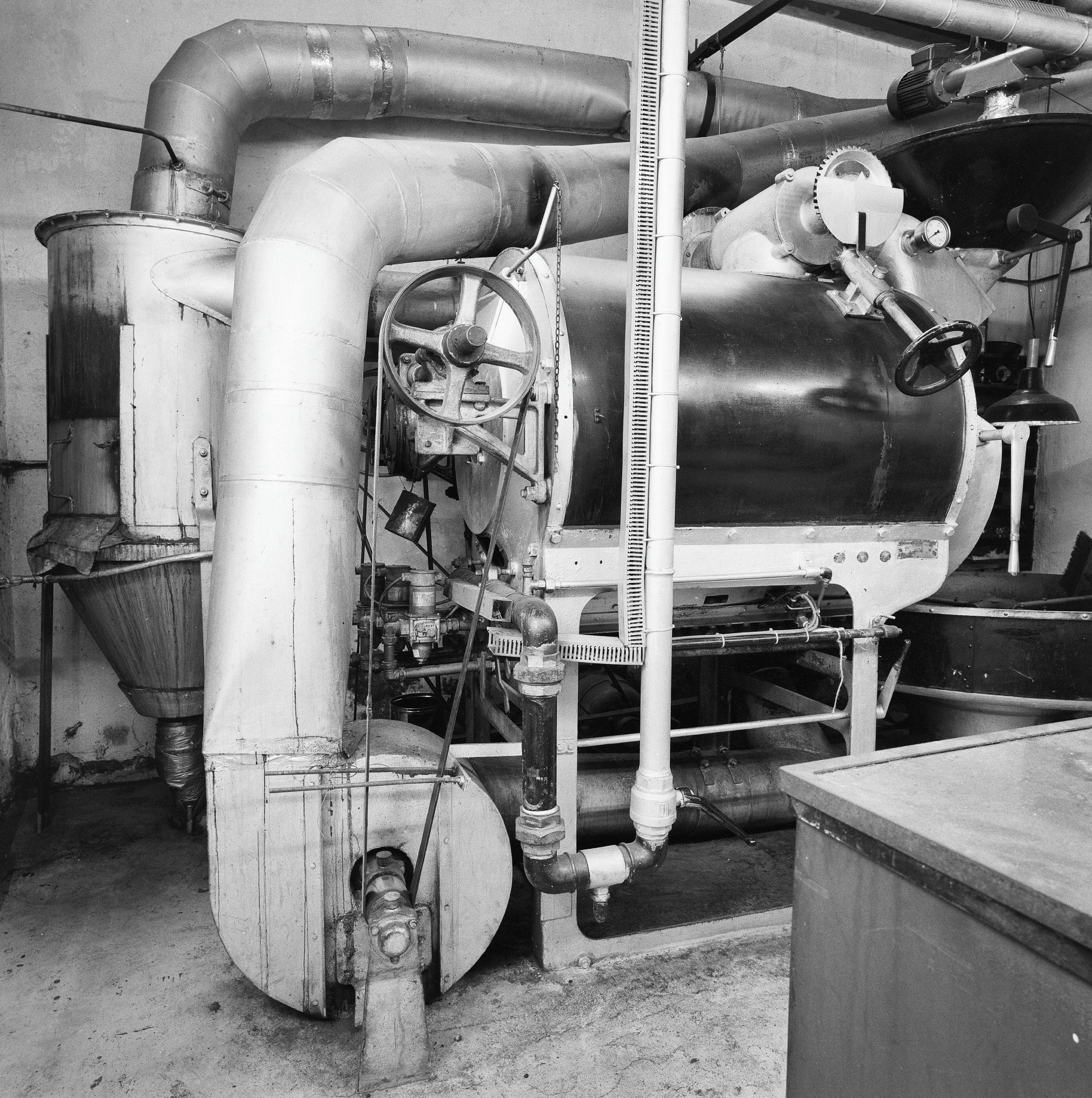 Koffiebranderij van Zijtveld: Interieur, cycloon-machine